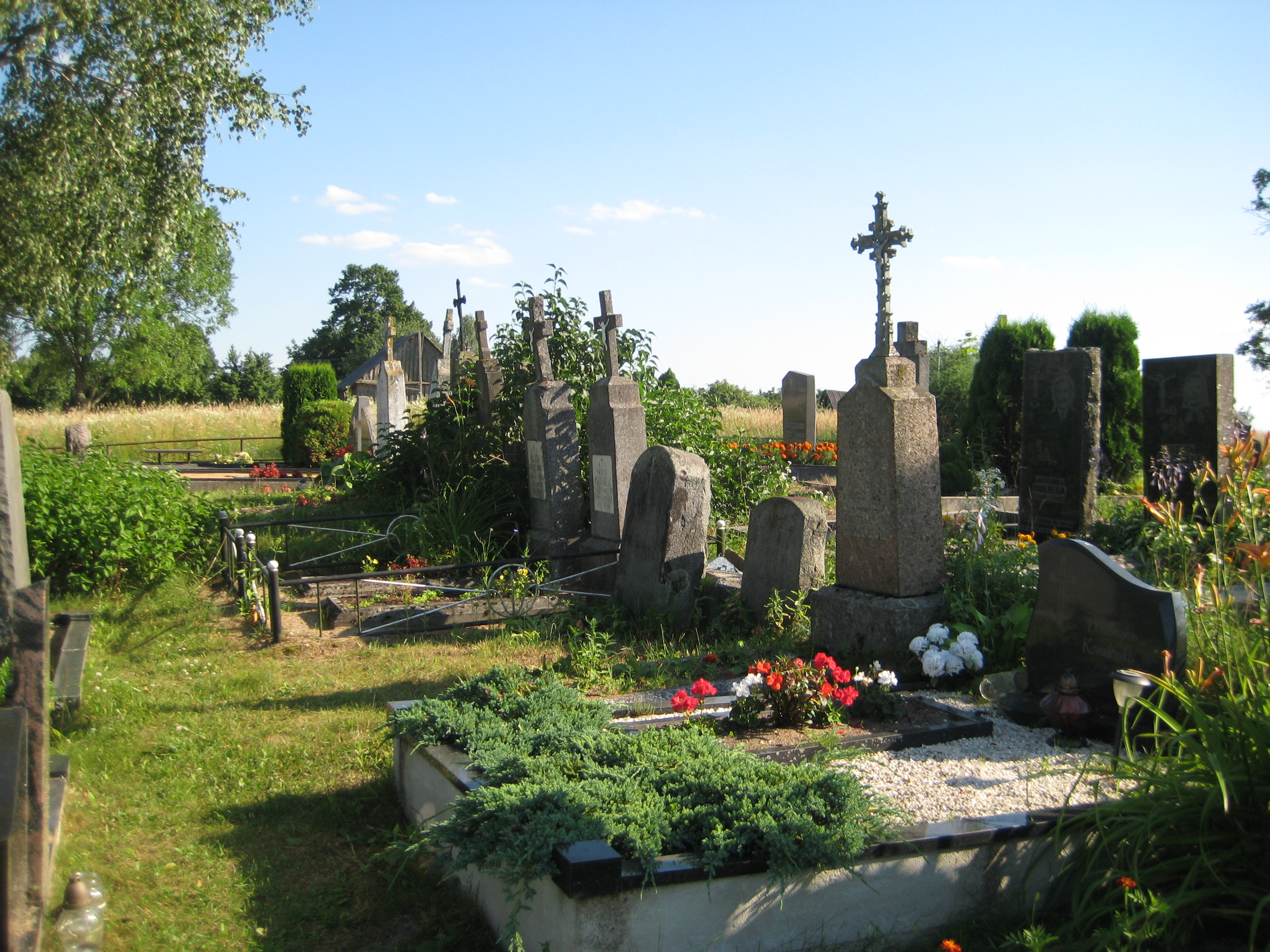 Panočiai, Lithuania